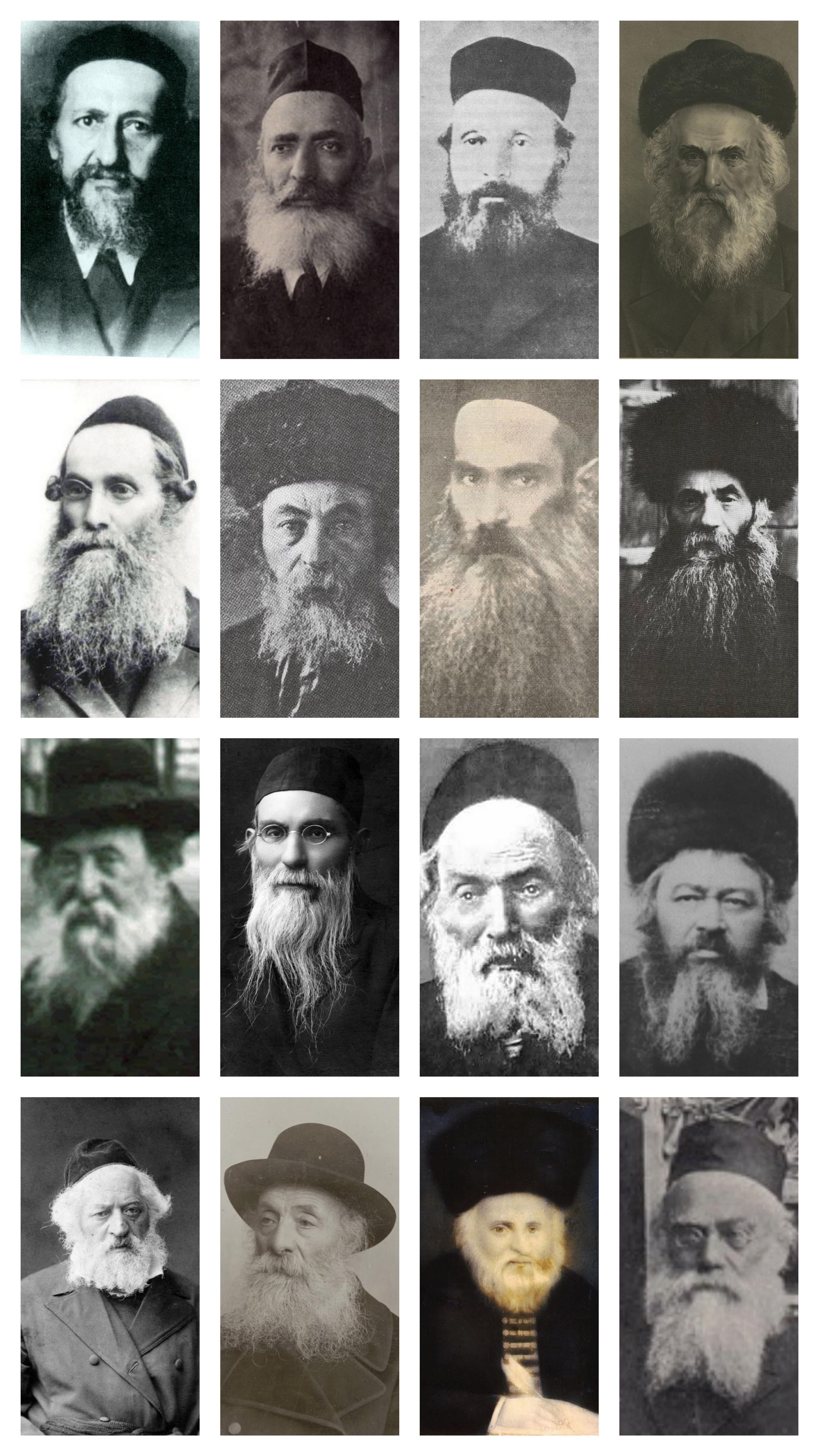 תלמידי חכמים ליטאים נודעים: (מימין לשמאל)Template:ששורה 1: רבי אברהם אבלי פאסוועלער; רבי אליעזר גורדון; רבי ירוחם ליבוביץ; רבי יצחק זאב הלוי סולובייצ'יקTemplate:ששורה 2: רבי איסר זלמן מלצר; רבי שלמה פוליצ'ק; רבי משה לנדינסקי; רבי אליהו דוד רבינוביץ' תאומיםTemplate:ששורה 3: רבי יחיאל מיכל אפשטיין; החפץ חיים; הסבא מסלבודקא; רבי חיים עוזר גרודזינסקיTemplate:ששורה 4: רבי שמעון שקופ; הגאון מווילנה; רבי אלכסנדר משה לפידות; רבי יצחק אלחנן ספקטור